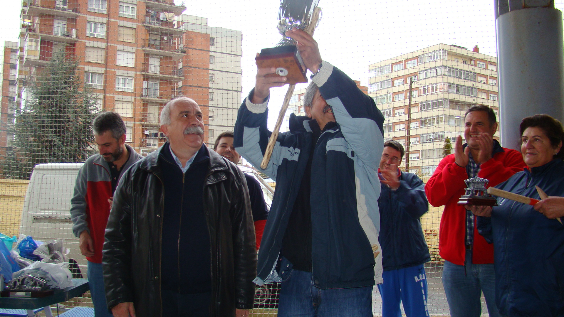 Entrega de la III Copa Cantábrica al seleicionador asturianu Pepe Pravia.